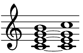 Leidtoon van B naar C. Graag vervangen door mooiere